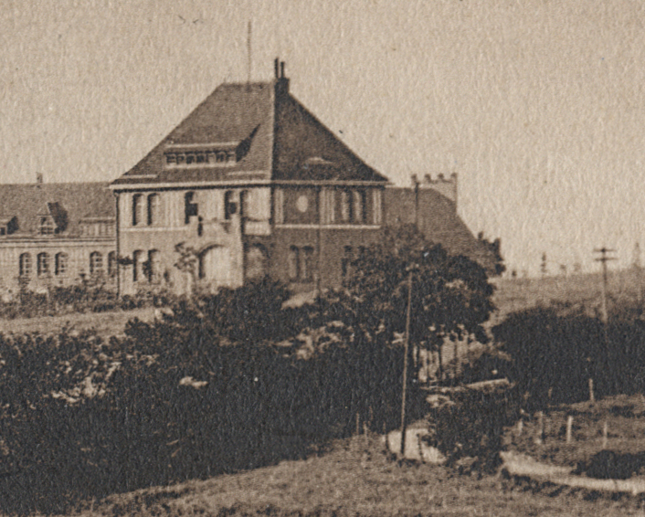 Mürwiker Burg um 1910, geerbt